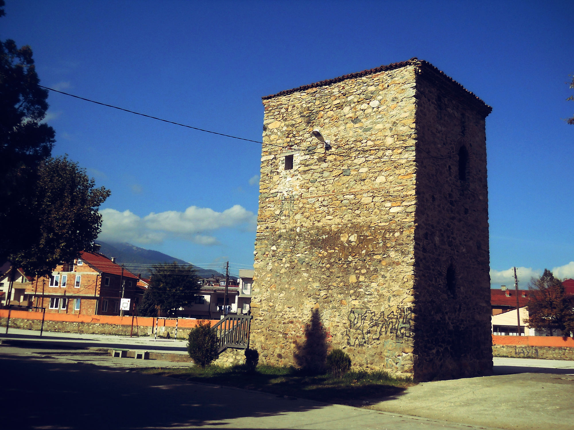 Кула „Зандан“ во дворот на ОУ „Стив Наумов“ Битола